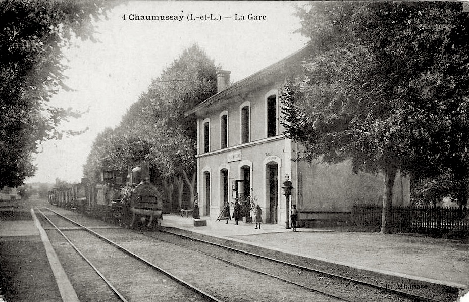 Arrivée du train en gare de Chaumussay